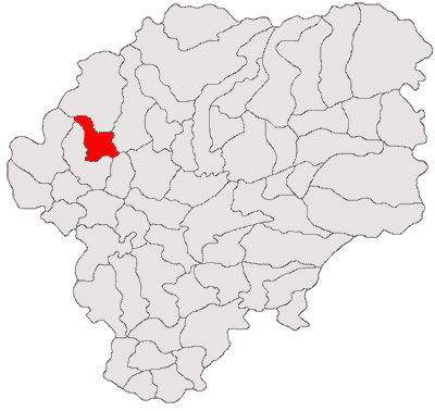 Categorie:Hărţi ale judeţului Bistriţa-Năsăud